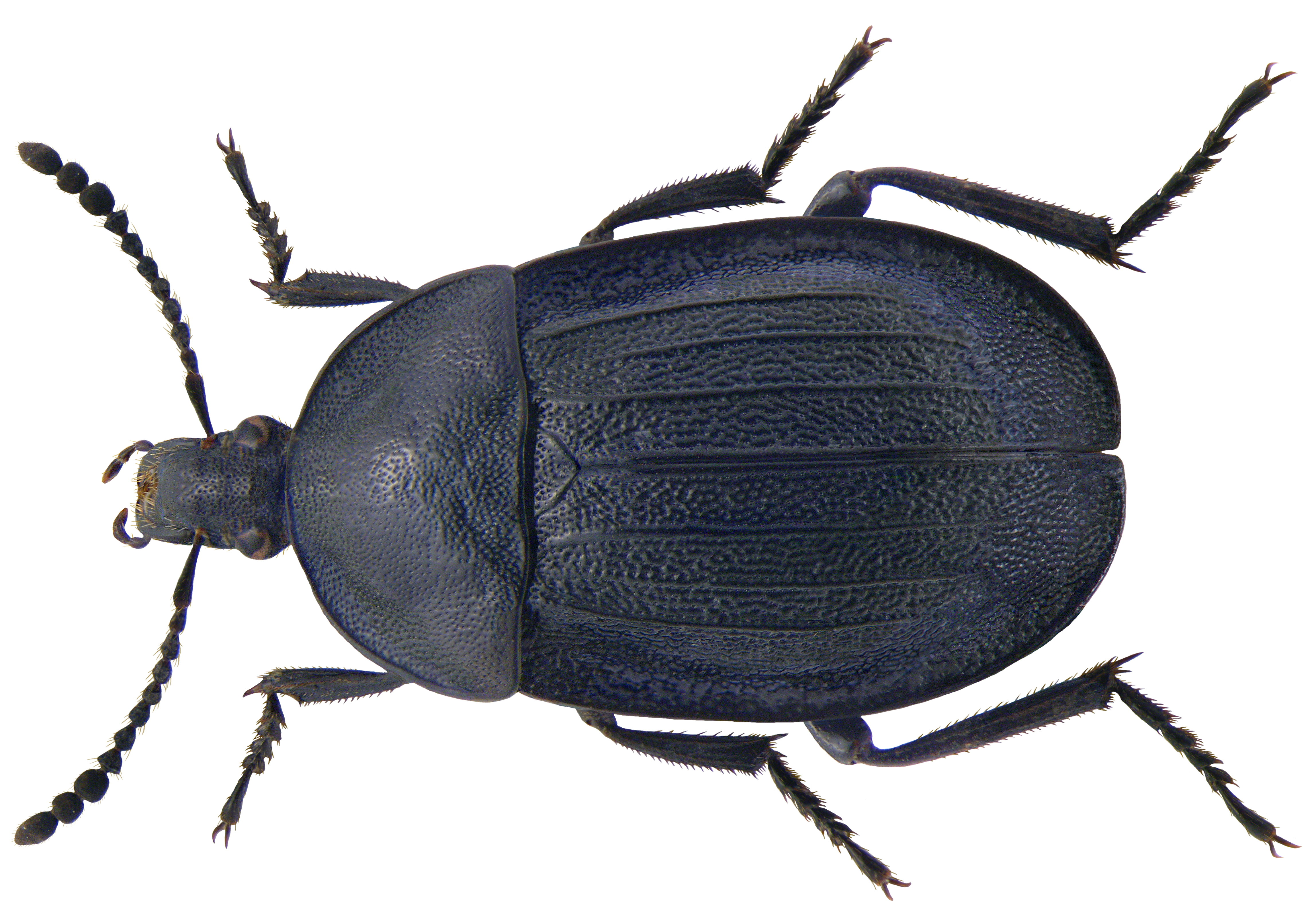 Familie: Silphidae Grösse: 10-15 mm Verbreitung: Europa Ökologie: ernähren sich von Schnecken Fundort: Germania, Bayern, Oberfranken, Selbitz leg. det. U.Schmidt, 2005 Foto: U.Schmidt, 2009